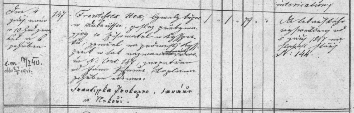 Matriční záznam o úmrtí: Hek František (úm.4.9.1847) - KYŠPERK, XXII, str.130, (č.z.5)